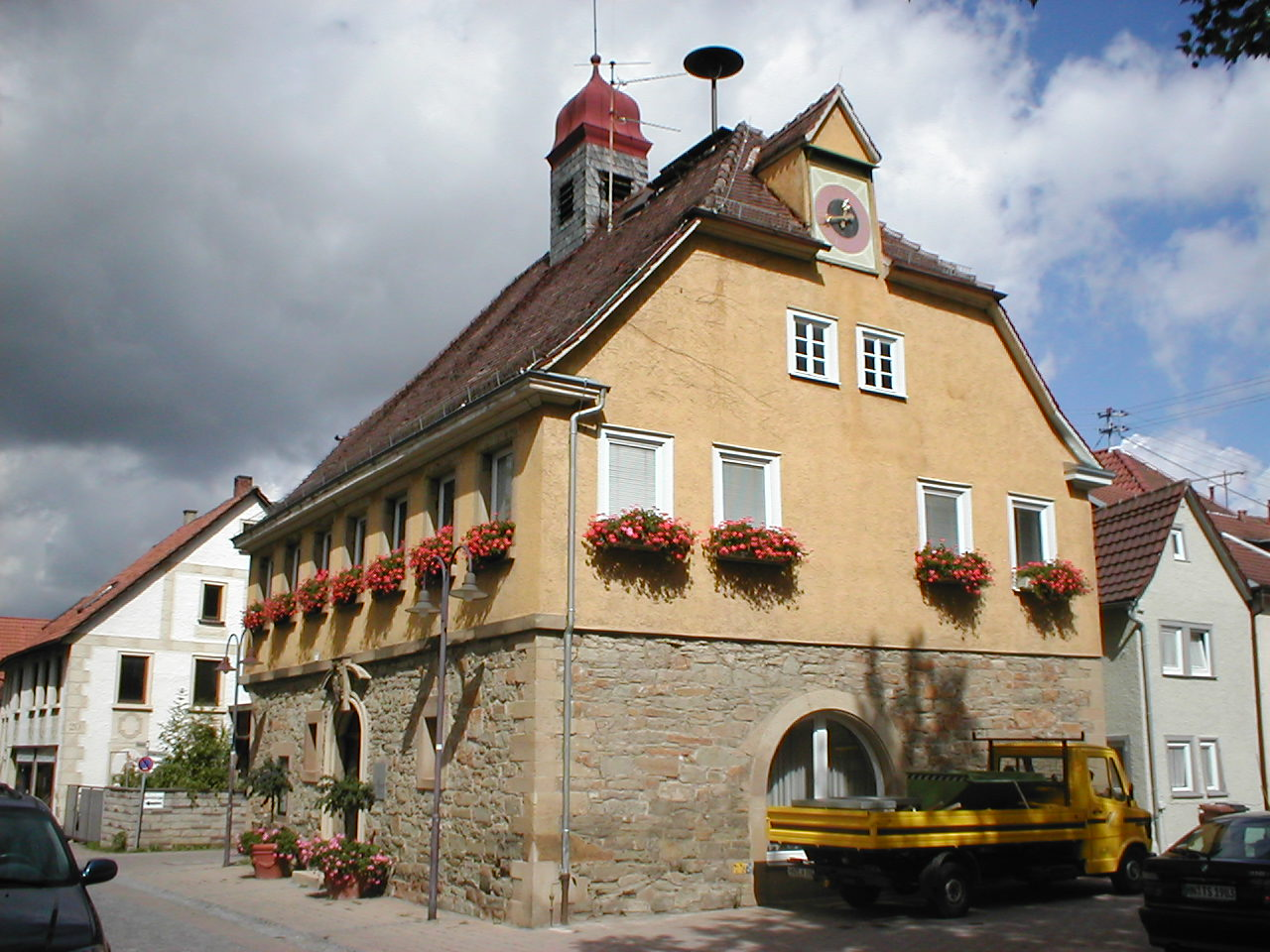 Rathaus von 1786 in Heilbronn-Horkheim